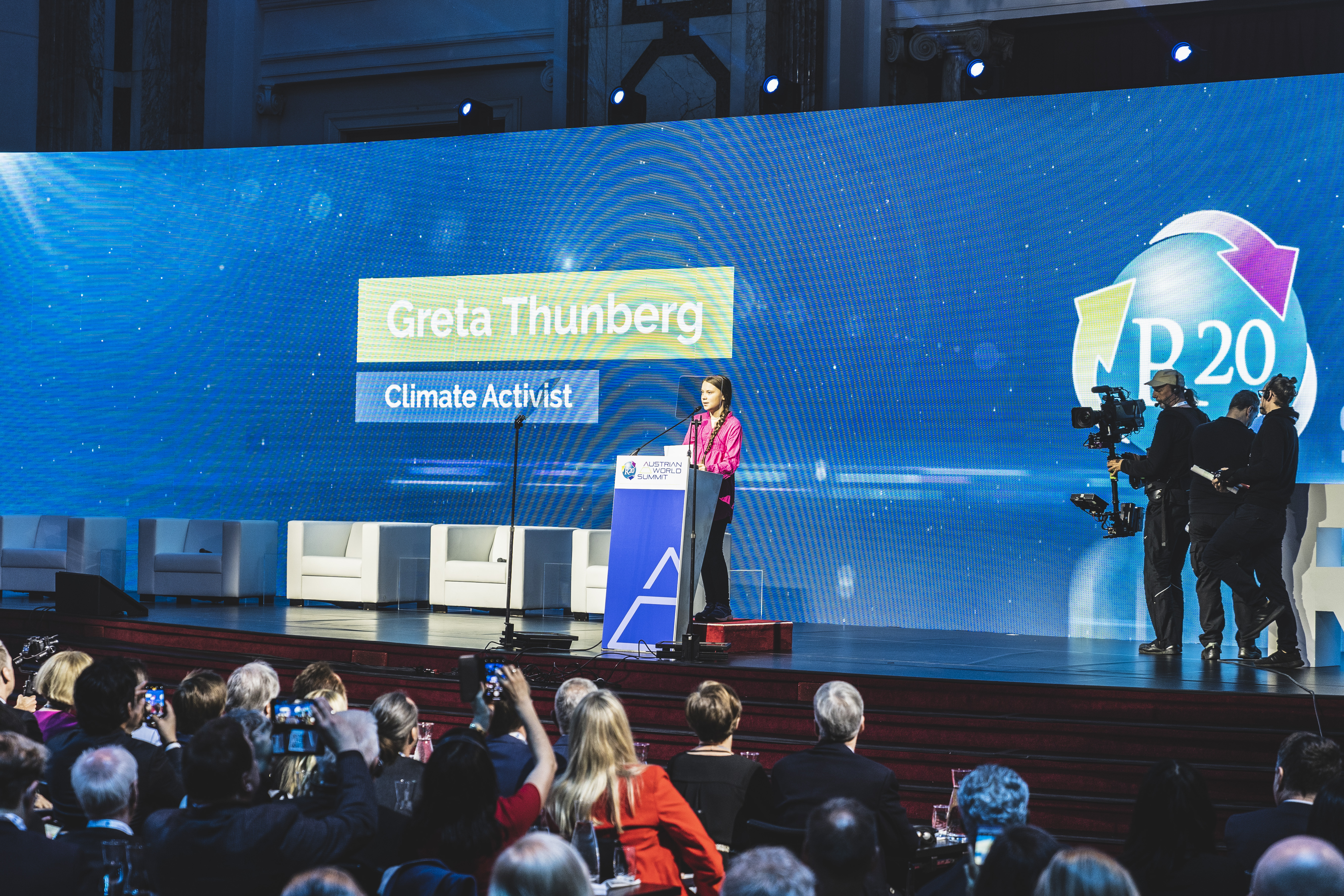 Karin Kneissl bei der Eröffnung des R20 Austrian World Summit mit Bundespräsident Alexander Van der Bellen, Klimaaktivistin Greta Thunberg und R20 Gründer Arnold Schwarzenegger, Ihre Botschaft: We need more Action! Am 28. Mai 2019 in der Wiener Hofburg. Copyright: Eugénie Berger